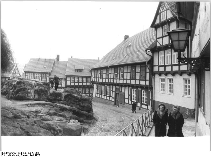 Quedlinburg, Fachwerkhäuser am Schlossberg ADN-ZB Mittelstädt 23.5.1977 Bez.Halle:Fachwerkhäuser am Schloßberg in Quedlinburg, dem ätesten Teil der Stadt.Diese Häuser wurden in den letzten Jahren restauriert. Information added by Wikimedia users.südlich des unteren Schlossplatzes, an den im Volksmund genannten Klippen in Quedlinburg.